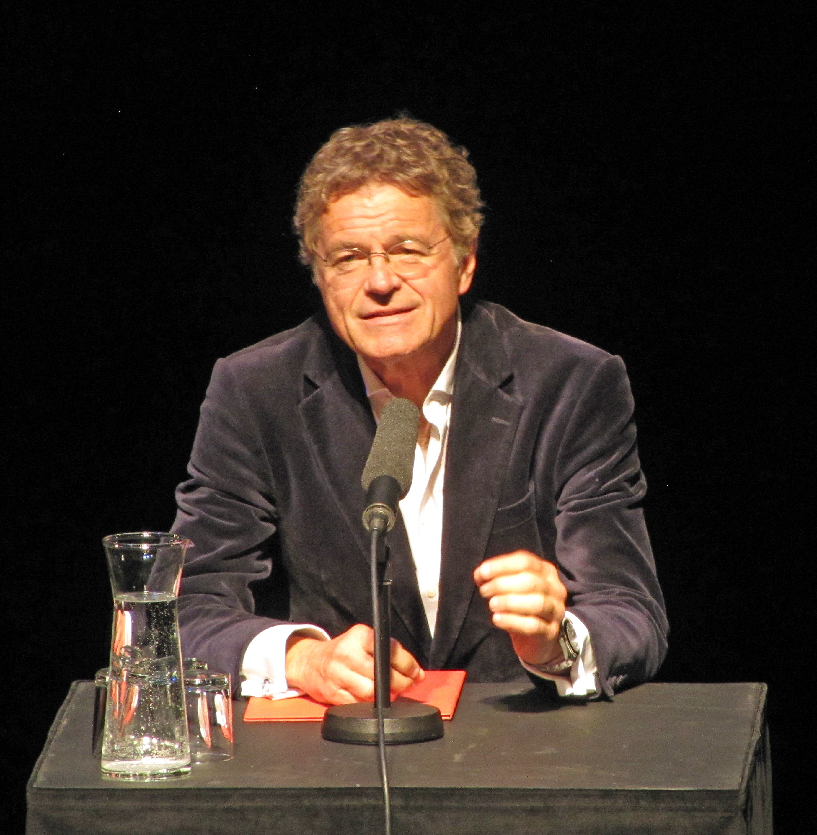 Alexander Skipis, am 21. Mai 2017, auf der Bühne des Schauspiel Frankfurt bei der Solidaritäts-Matinee für Deniz Yücel und inhaftierte Journalistinnen und Journalisten in der Türkei.